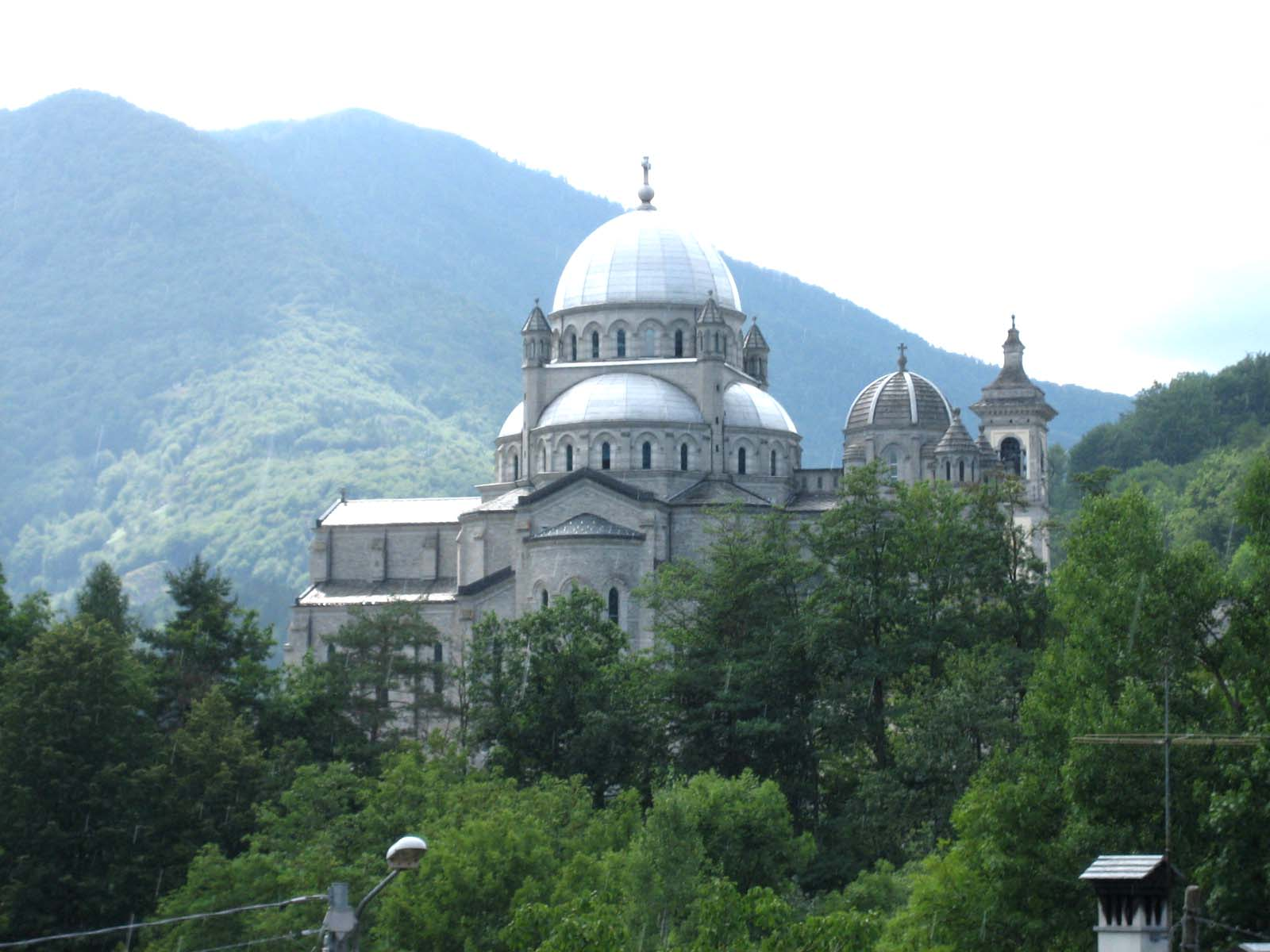 Madonna del Sangue in Re, Valle Vigezzo (Italien)